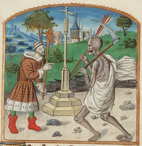 Triboulet, Complainte contre la mort: Discours of Triboulet to Death // Courtjester Triboulet encounters Death. The Hague, KB, 71 G 61 Contents: Pierre d’Ailly, Le jardin amoureux. Triboulet, Complainte contre la Mort Place of origin, date: France; c. 1500